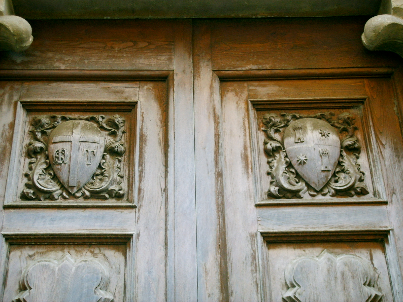 Santa Maria Vergine della Croce al Tempio, stemmi portale